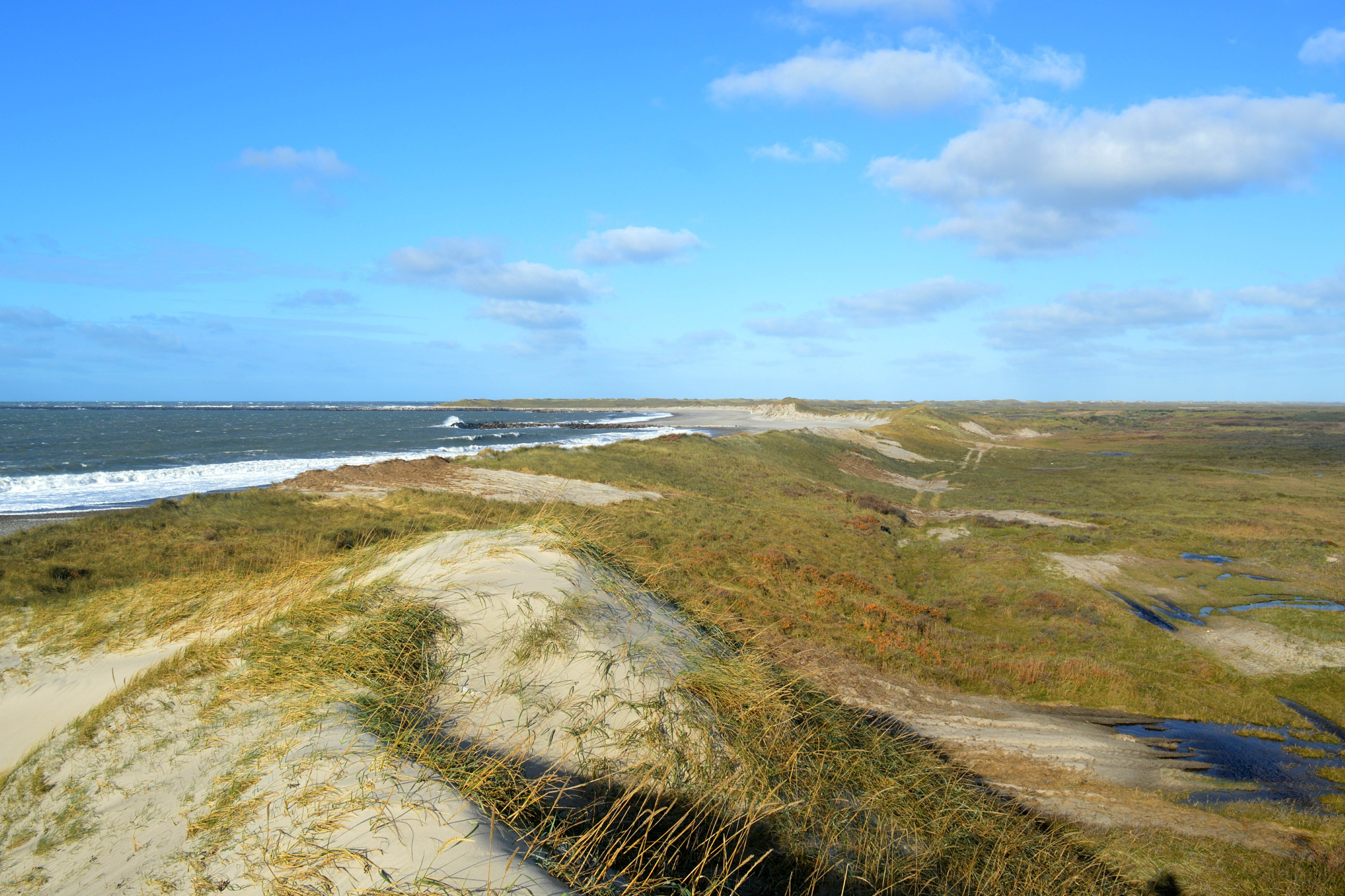 Agger in Denmark - Agger Tange